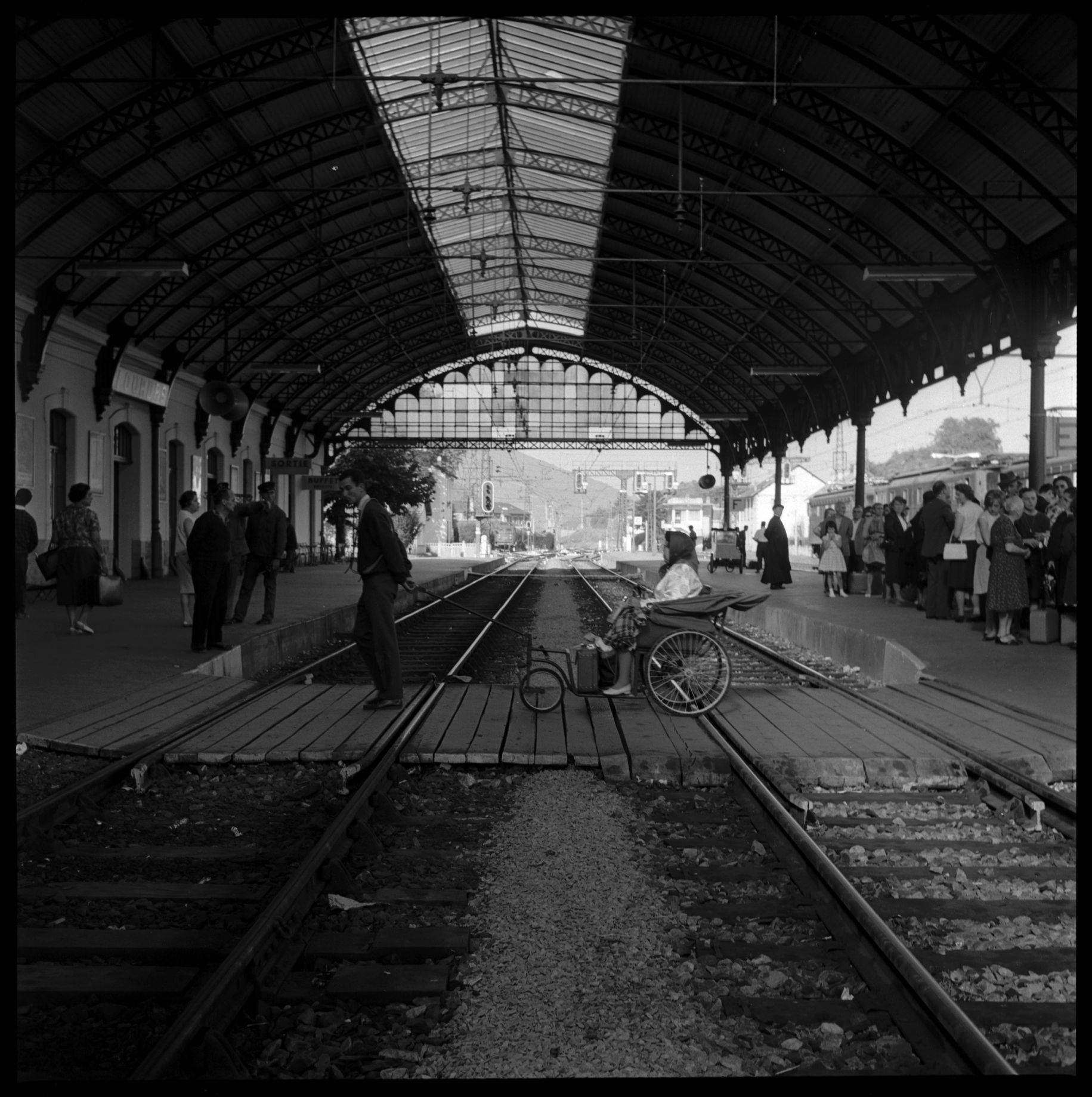 Gare de Lourdes (Hautes-Pyrénées). Août 1964. Vue de plusieurs personnes à la gare de Lourdes. Observation: Photographie réalisée pour l'ouvrage de André Rimailho, "Quelqu'un à Lourdes" publié en juin 1965 aux Editions du Centurion.